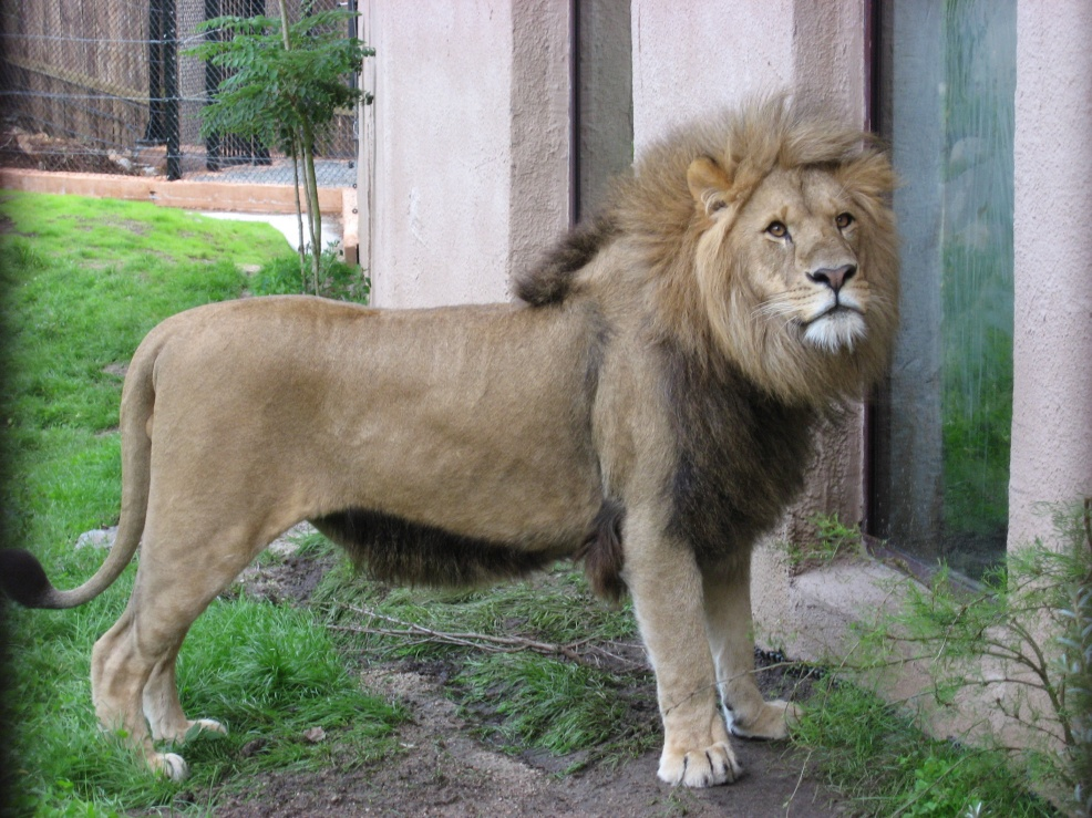 Løve i Kristiansand Dyrepark